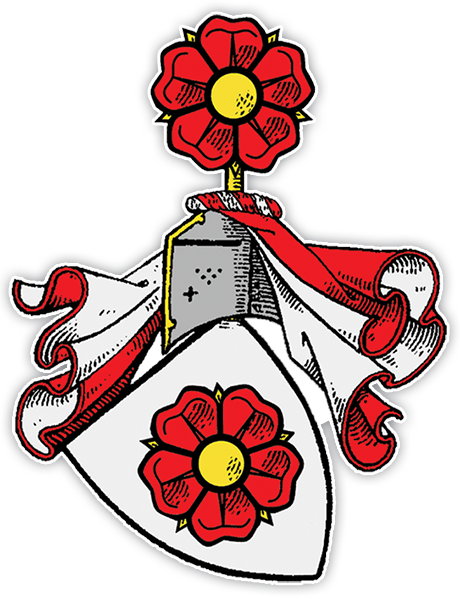 Stammwappen der Herren von Rosenberg (tschechisch Páni z Rožmberka, Plural Rožmberkové), im 15. Jh. einflussreichstes Adelsgeschlecht in Böhmen, dem Geschlecht der Witigonen entstammend, erloschen 1611.